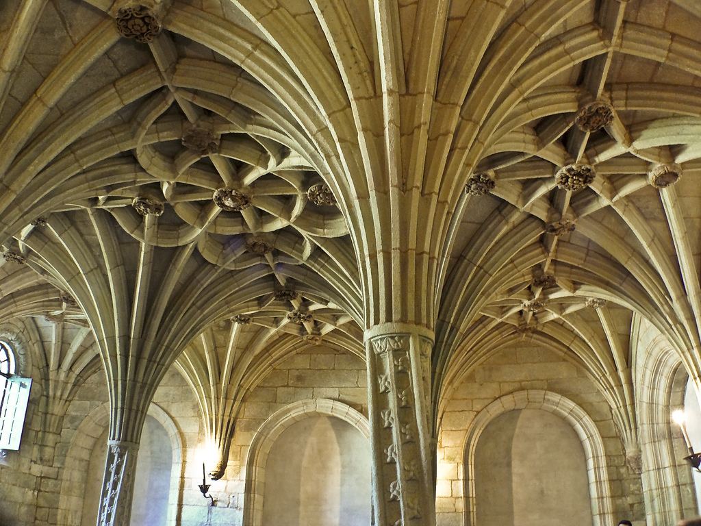 gl: Sala Capitular do Mosteiro de Santa María de Oseira - Cea (Ourense)